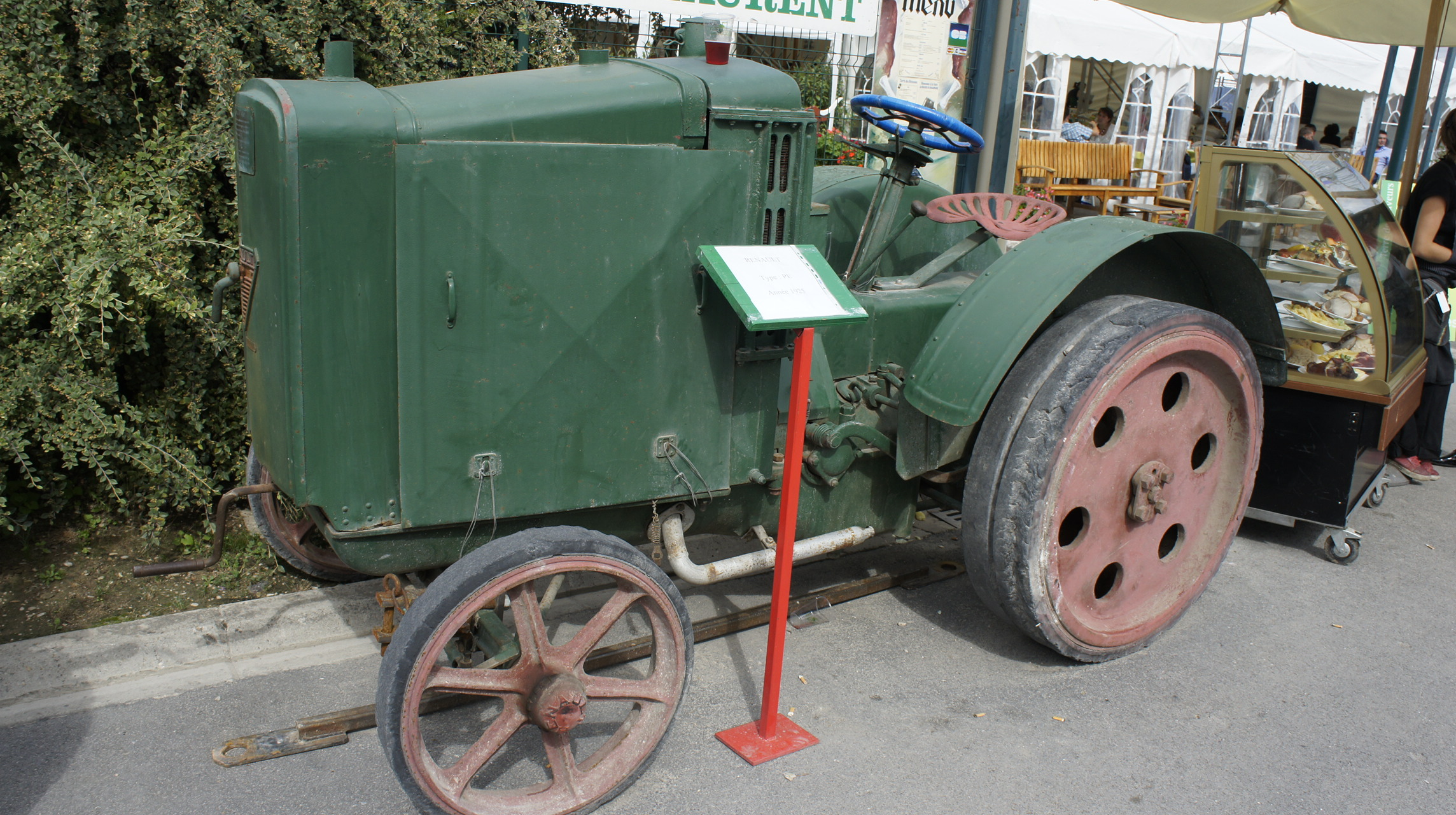 Véhicule agricole Renault de type PE de 1926 lors de la foire de chalons de 2011.